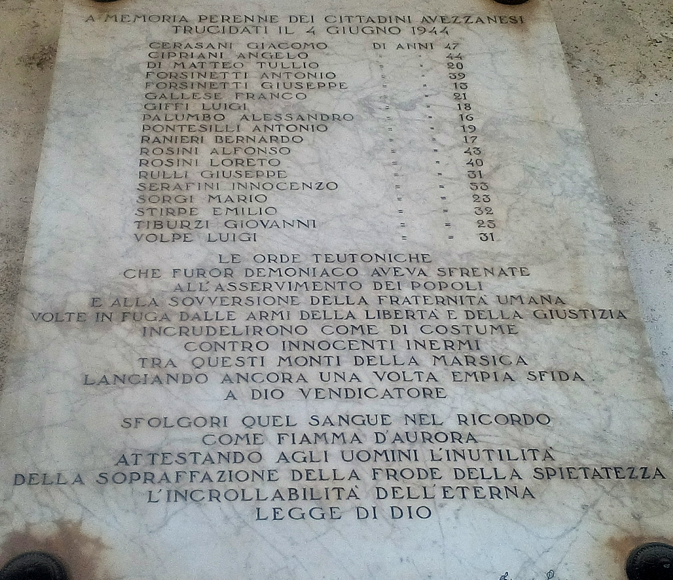 Targa ricordo posta nel palazzo municipale di Avezzano